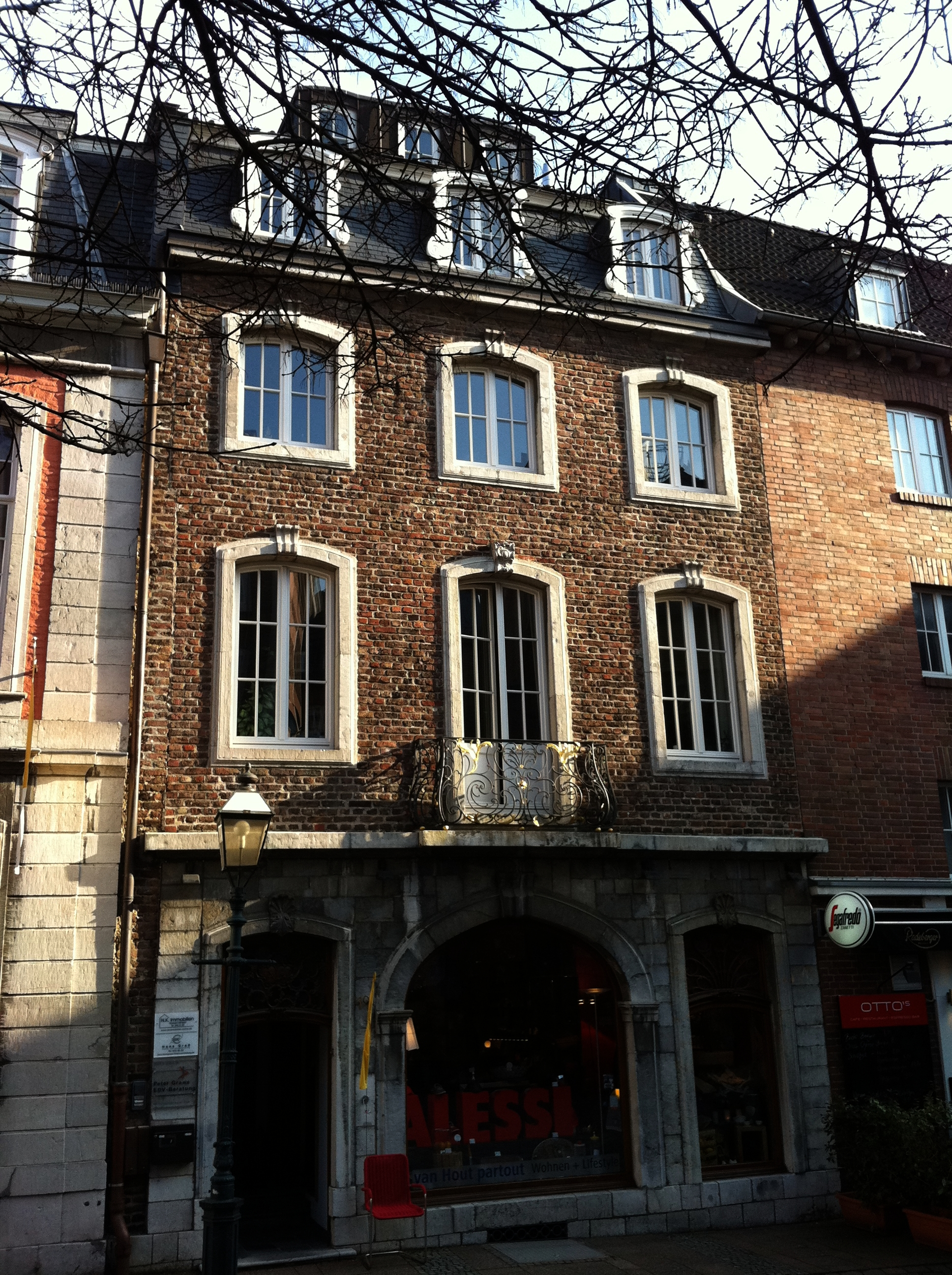 Beispiel für Translozierungen in der Aachener Altstadt: Haus Hühnermarkt 19: Die Zierelemente stammen aus zerstörten Aachener Häusern, so die Tür aus der Bahnhofstraße 22, der Balkonkorb aus dem "Blinden Esel" aus der Franzstraße 8 und die Blausteingewände aus dem Haus Krugenofen 15-17